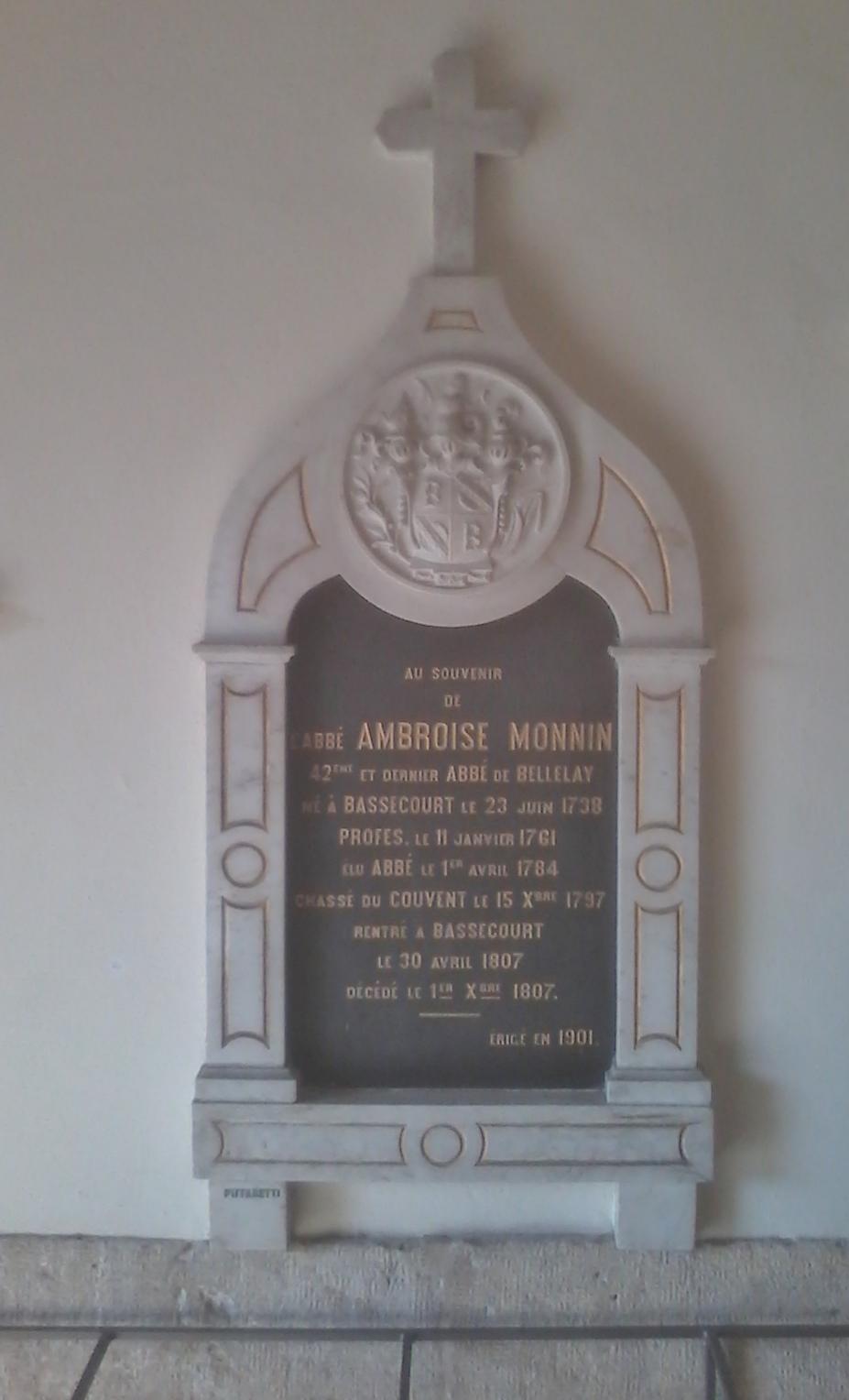 Stèle de l'Abbé Ambroise Monnin, Porche Eglise St. Pierre et Paul, Bassecourt, érigée en 1901.